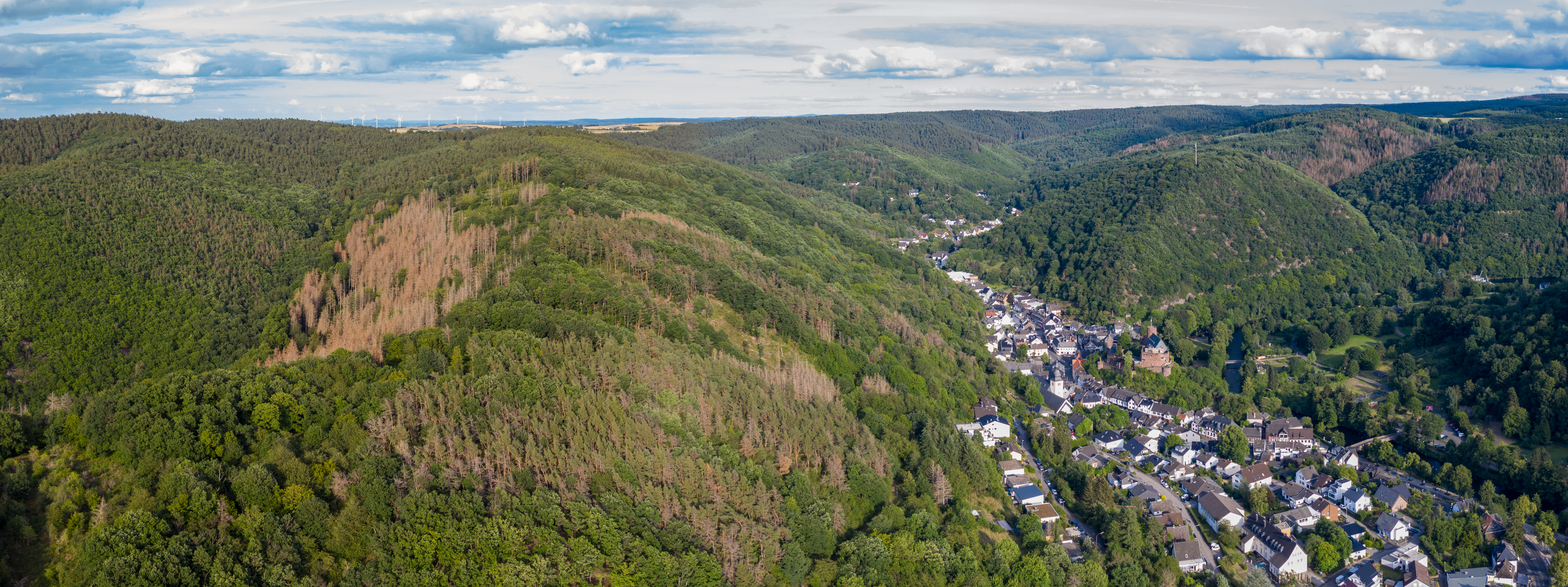 Sonnenberg, im Tal liegt die Stadt Heimbach - Luftaufnahme